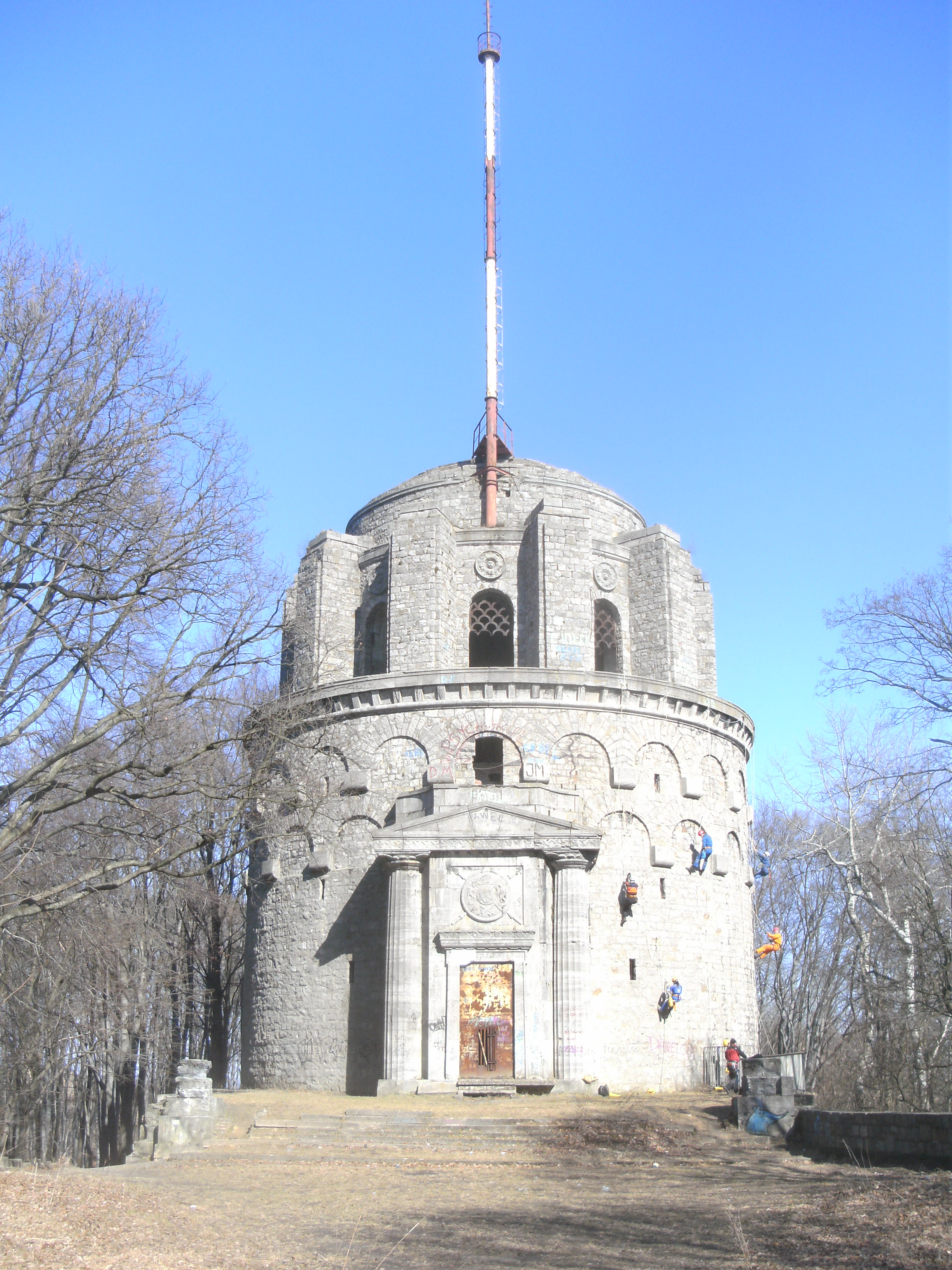 Stettin, nördlicher Stadtteil Gotzlow am linken Oderufer. Bismarckturm auf dem "Weinberg", der höchsten Erhebung am Oderufer. An der rechter Seite des Turms an Seilen hängende polnische Kletterer beim Training.